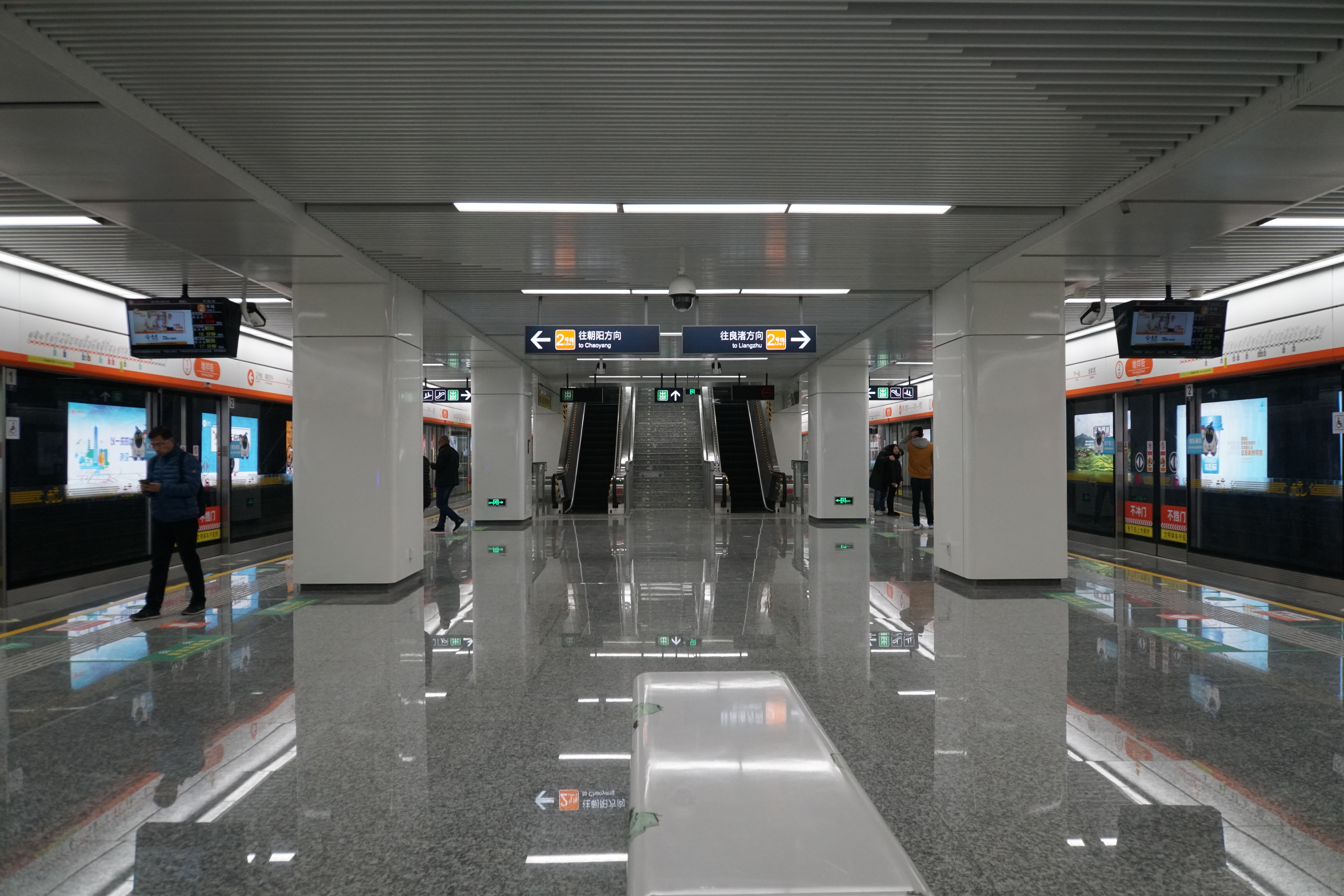 墩祥街站站台